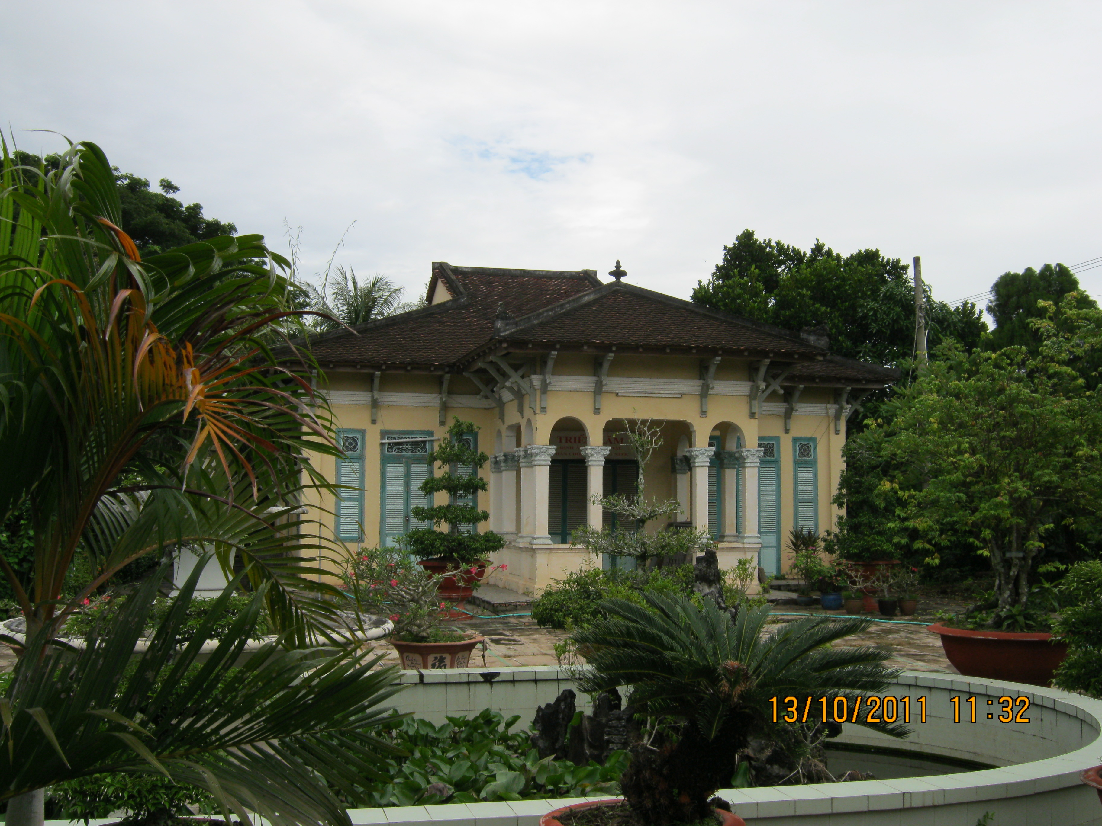 Một ngôi nhà cổ kiểu Pháp ở thành phố Cao Lãnh, tỉnh Đồng Tháp (Việt Nam).